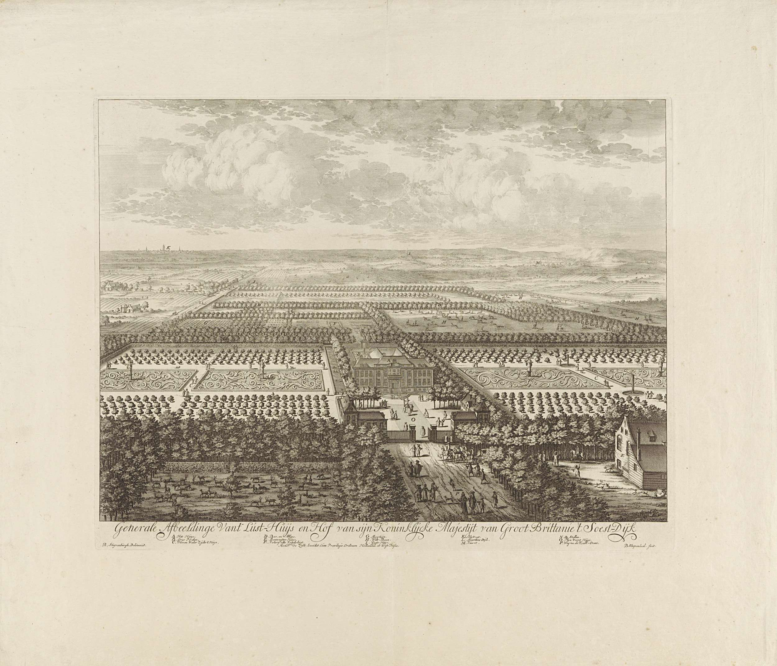 Gezicht op Paleis Soestdijk in vogelvlucht perspectief. Rondom en achter het paleis de tuinen. Onderaan in de marge een legenda A-P.; Iconclasscode: 41A11; Iconclasscode: 41A636; ; print